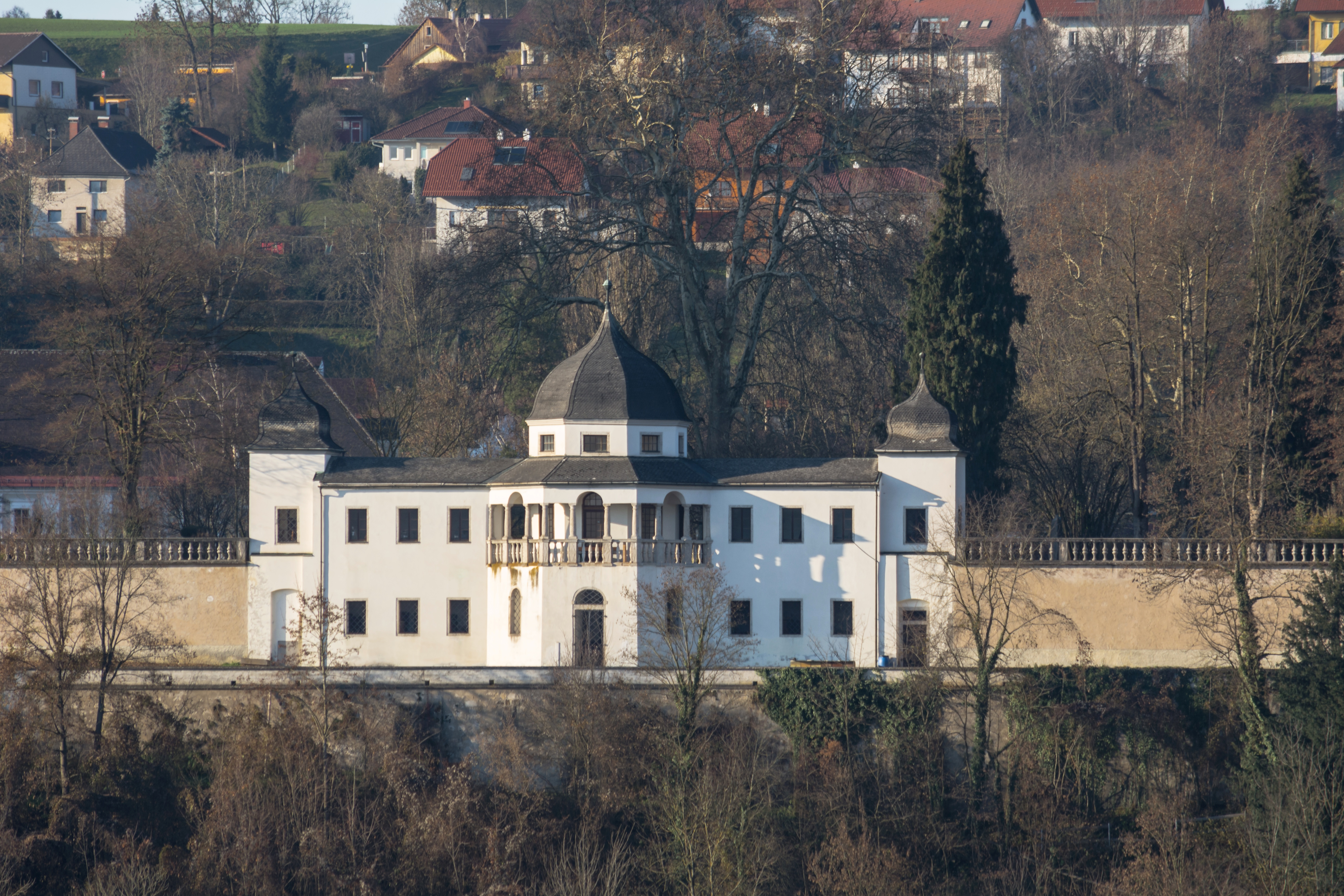 Die sogenannte Moschee des Stifts Kremsmünster wurde in den Jahren 1640 bis 1642 errichtet.